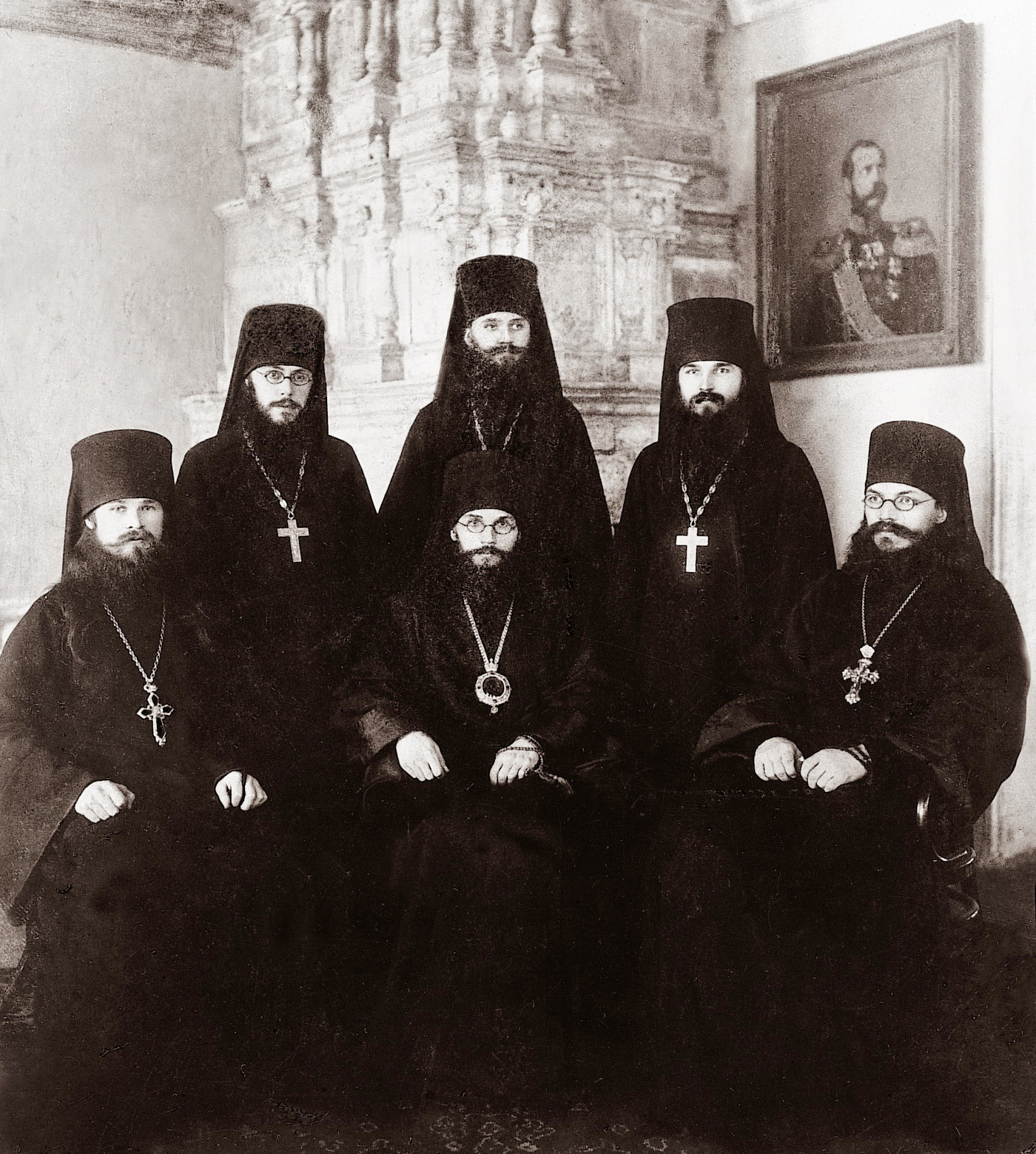 Сидят: в центре епископ Феодор (Поздеевский), слева архимандрит Варлаам (Ряшенцев), справа архимандрит Симеон (Холмогоров); стоят слева направо: иеромонах Гурий (Степанов), иеромонах Филипп (Гумилевский), иеромонах Герман (Ряшенцев). Московская Духовная Академия, 1909 - 1910 годы